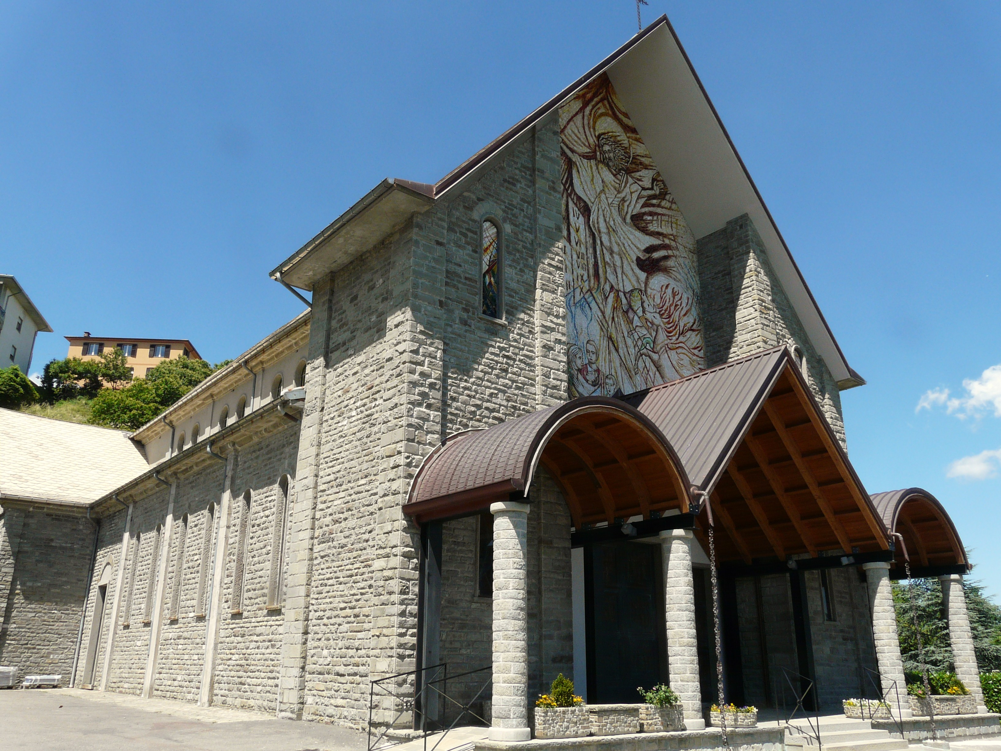 Chiesa di Santo Stefano Martire, Tarsogno, Tornolo, Emilia Romagna, Italia